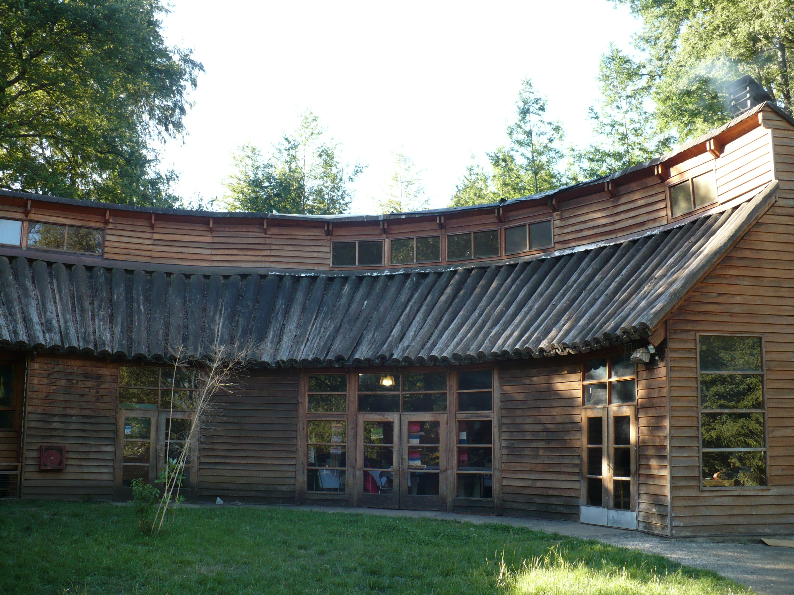 Vista frontal Aldea Centro Intercultural comuna Curarrehua región de La Araucanía